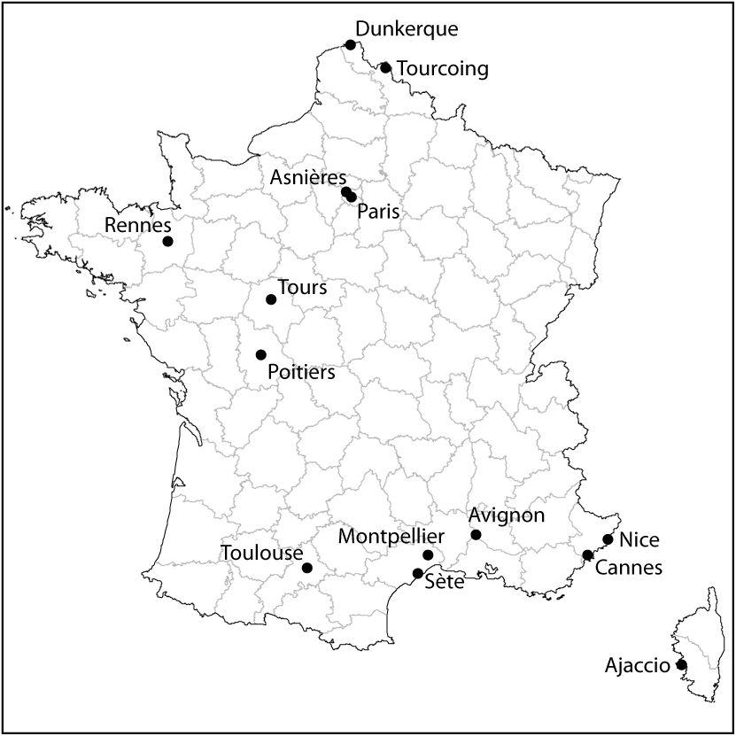 Carte des clubs engagés dans le championnat de France Pro A de volley-ball 2002-2003